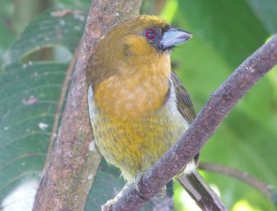 A Prong-billed Barbet Semnornis frantzii